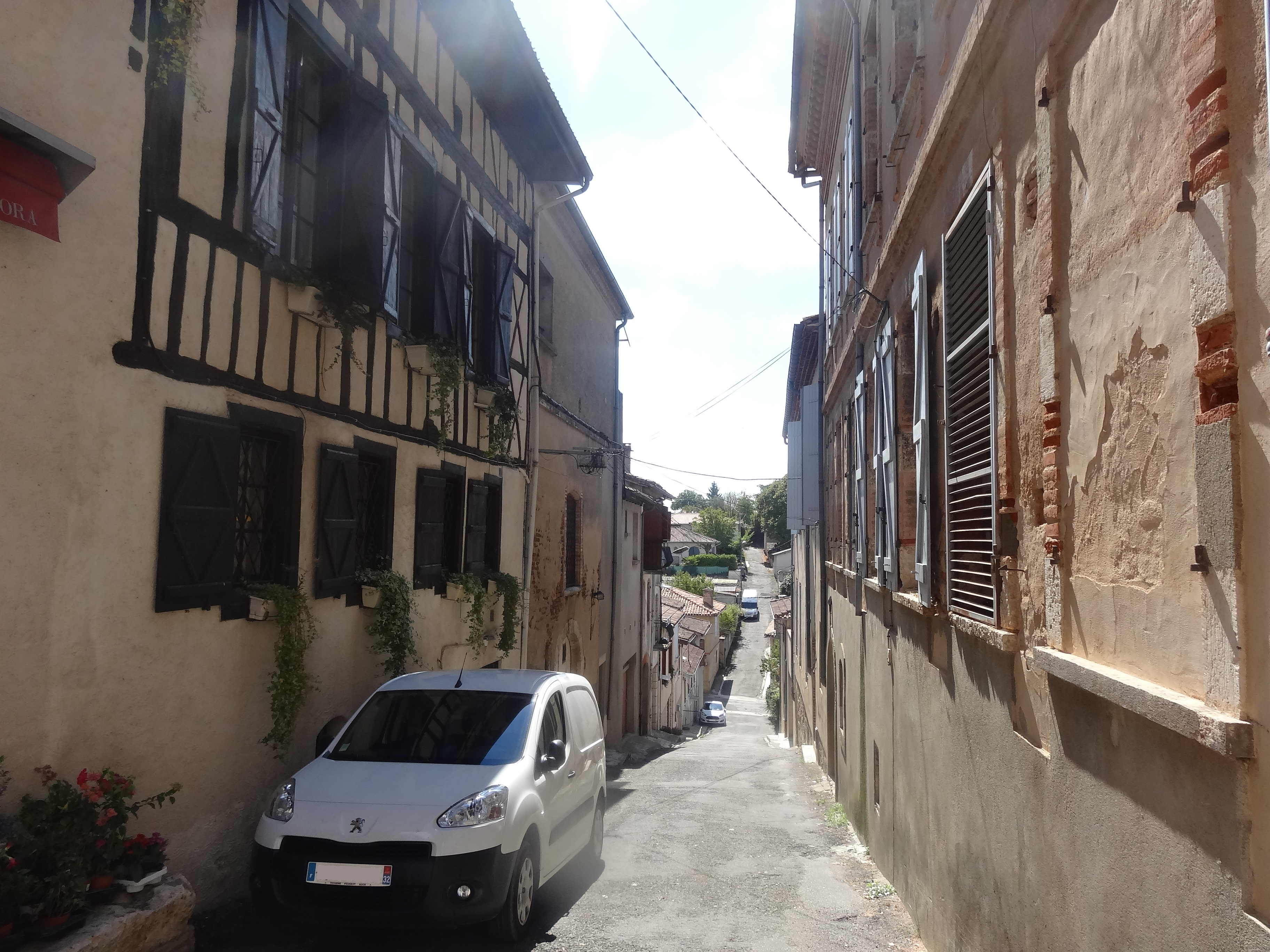 Rue escarpée de Gimont.